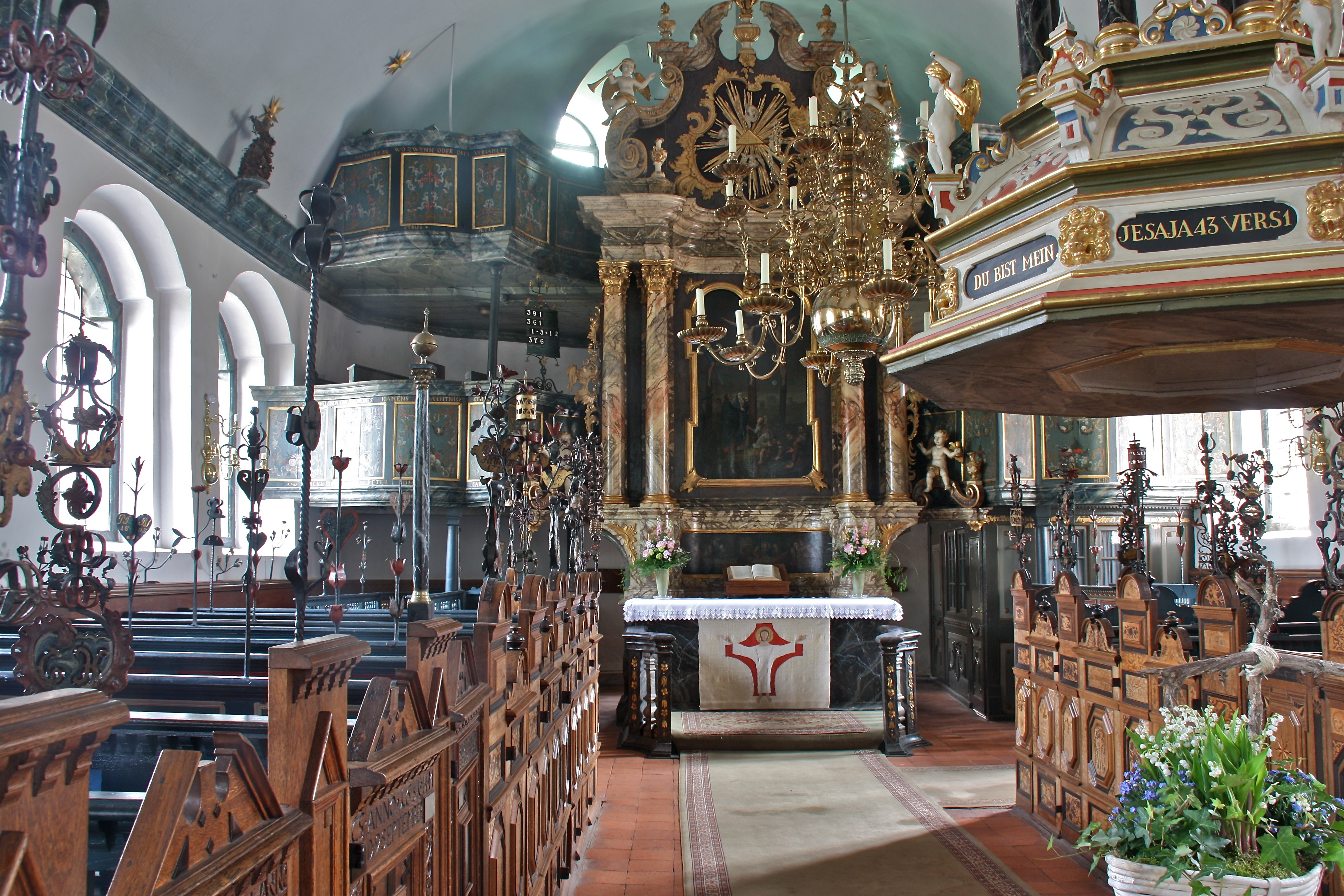 Hamburg, Altengamme, Kirche St. Nicolai, Altar This is a photograph of an architectural monument.